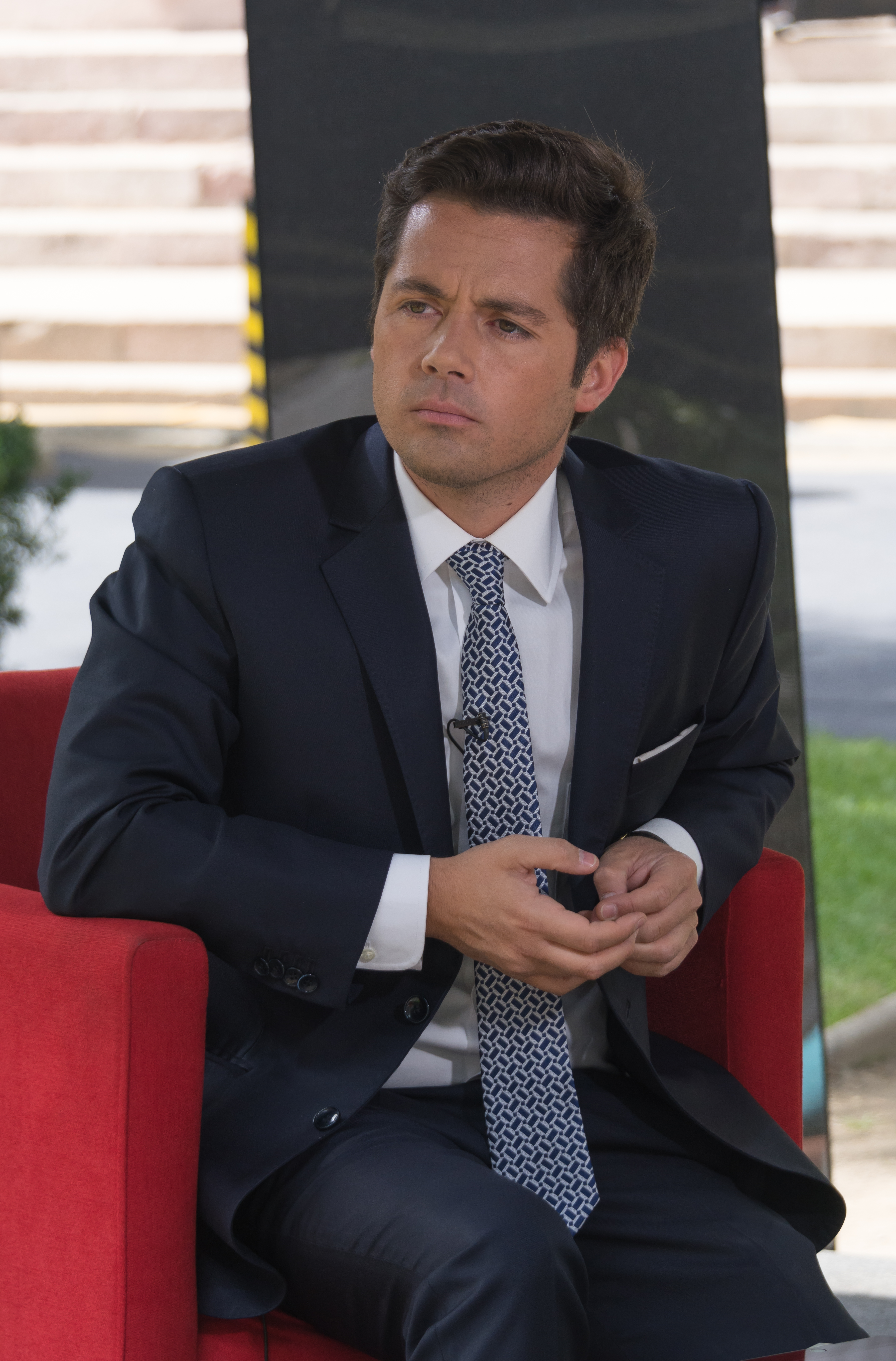 Congreso Futuro, Ex Congreso Nacional, Santiago, Región Metropolitana, Chile.